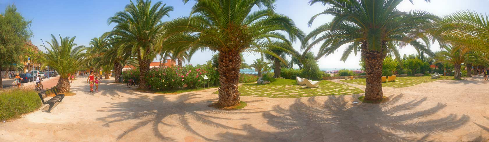 zona pedonale e una delle tante oasi del lungomare sud di San Benedetto del Tronto